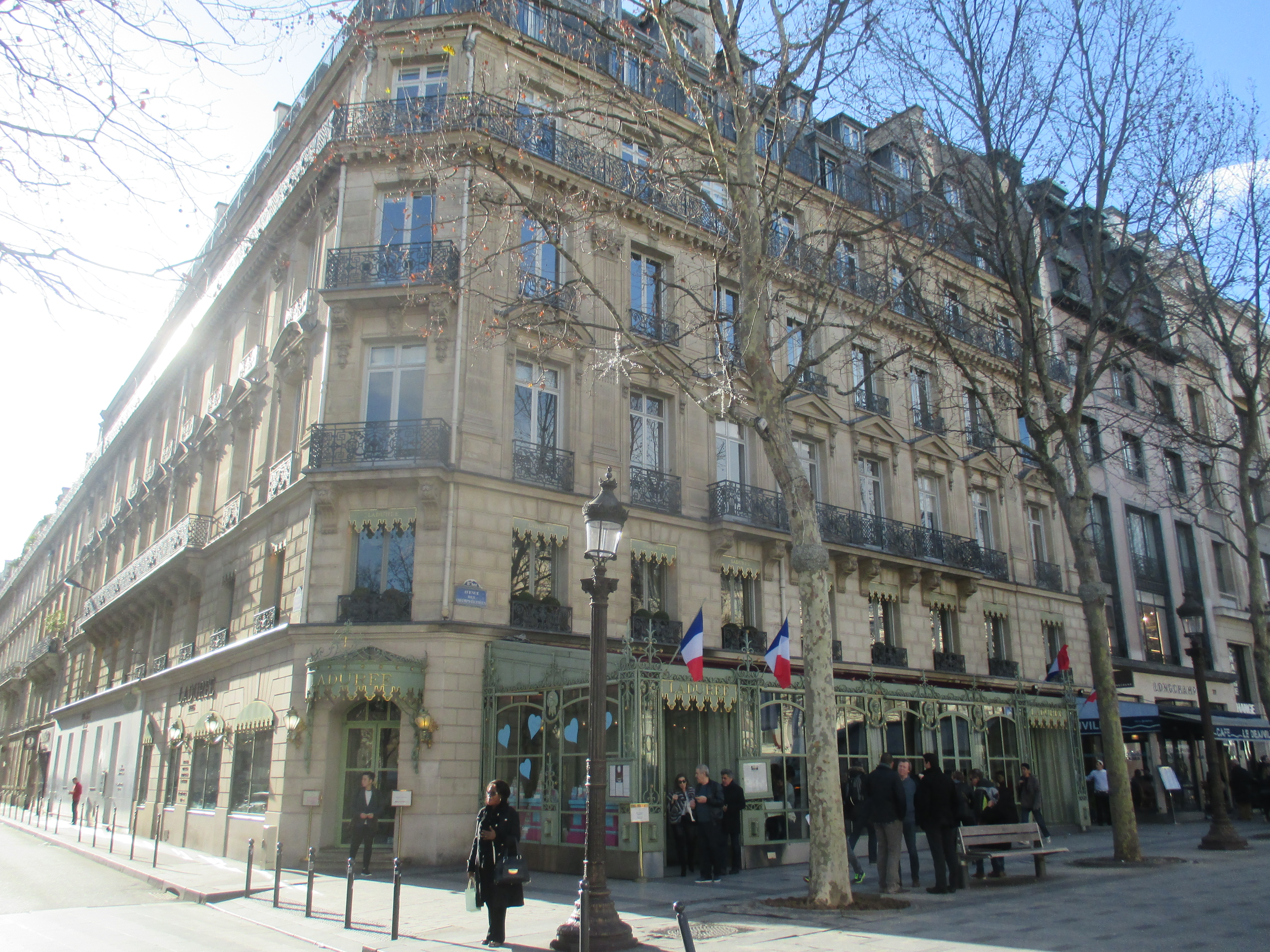 Ladurée, avenue des Champs-Élysées (Paris VIIIe)